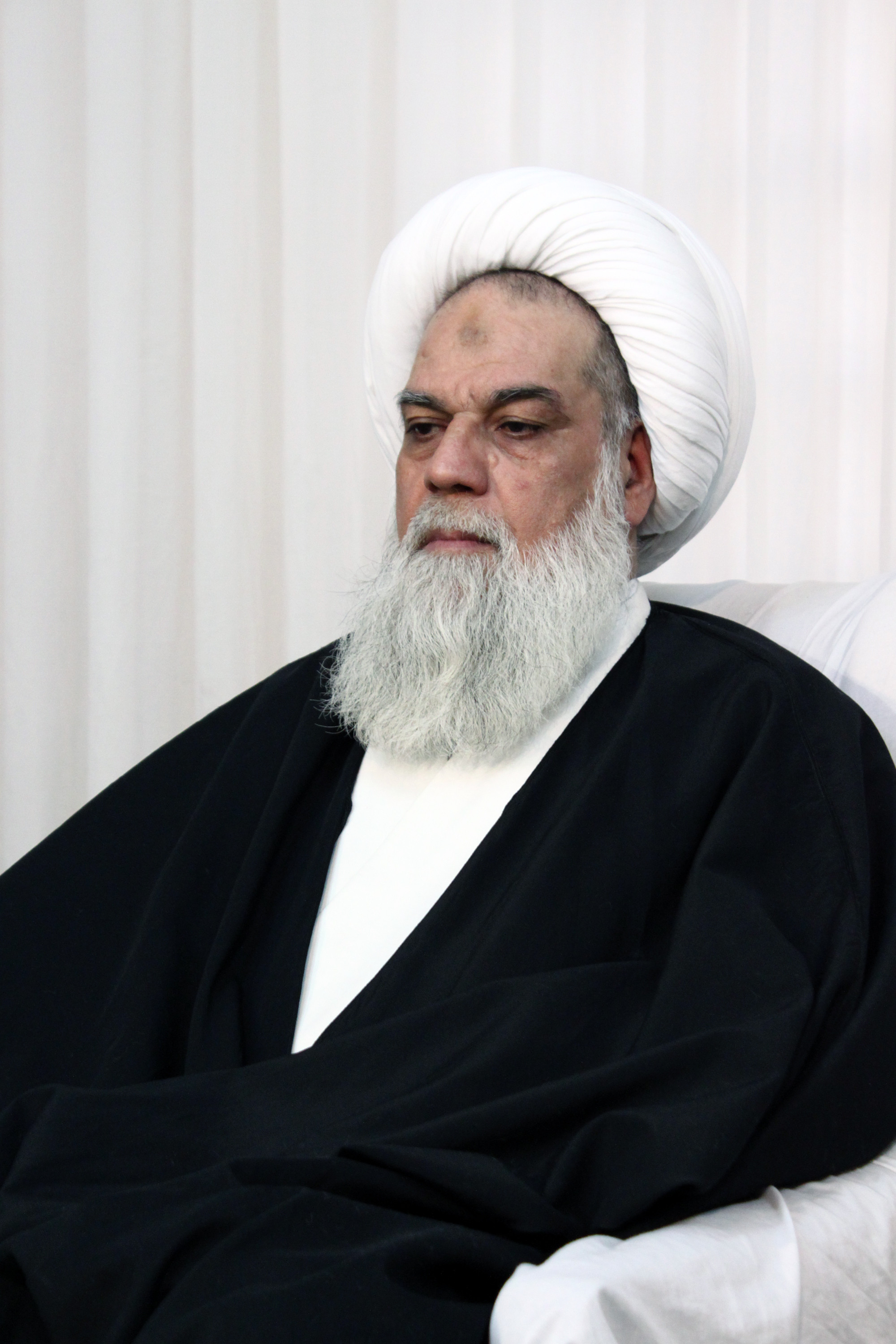 خلیل مبشر کاشانی متولد 1330 در کاشان است. وی در سال 1346 برای تحصیل علوم حوزوی عازم شهر قم گردید. وی در حال حاضر از مراجع تقلید صاحب رساله شهر قم است که در زمینه فقه و عرفان تدریس میکند.